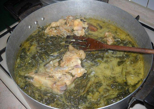 Minestra Pasquale a Casale di Carinola